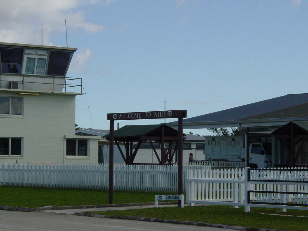 Arrival at Niue Airport